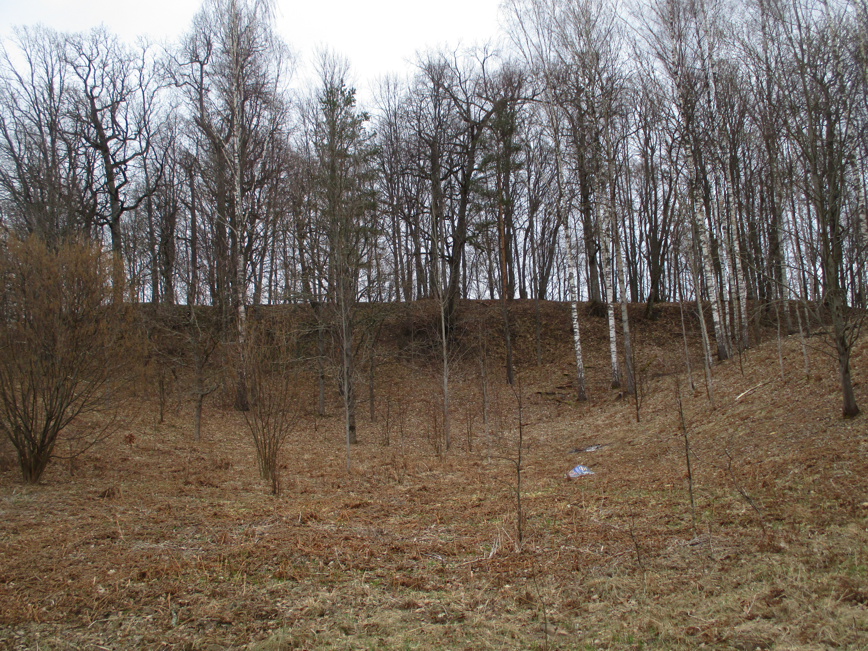 Skats uz Vīna kalna pilskalnu no DR.